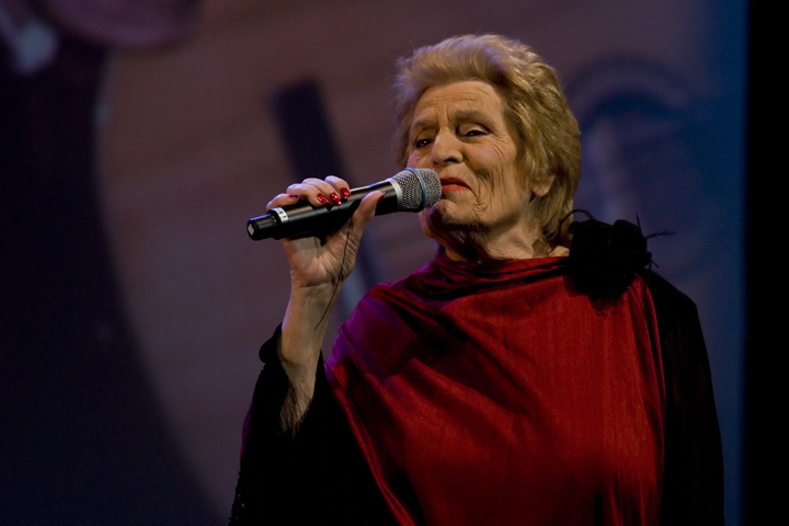 La cantante de fados Celeste Rodrigues